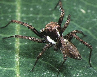 male Portia fimbriata from Okinawa.